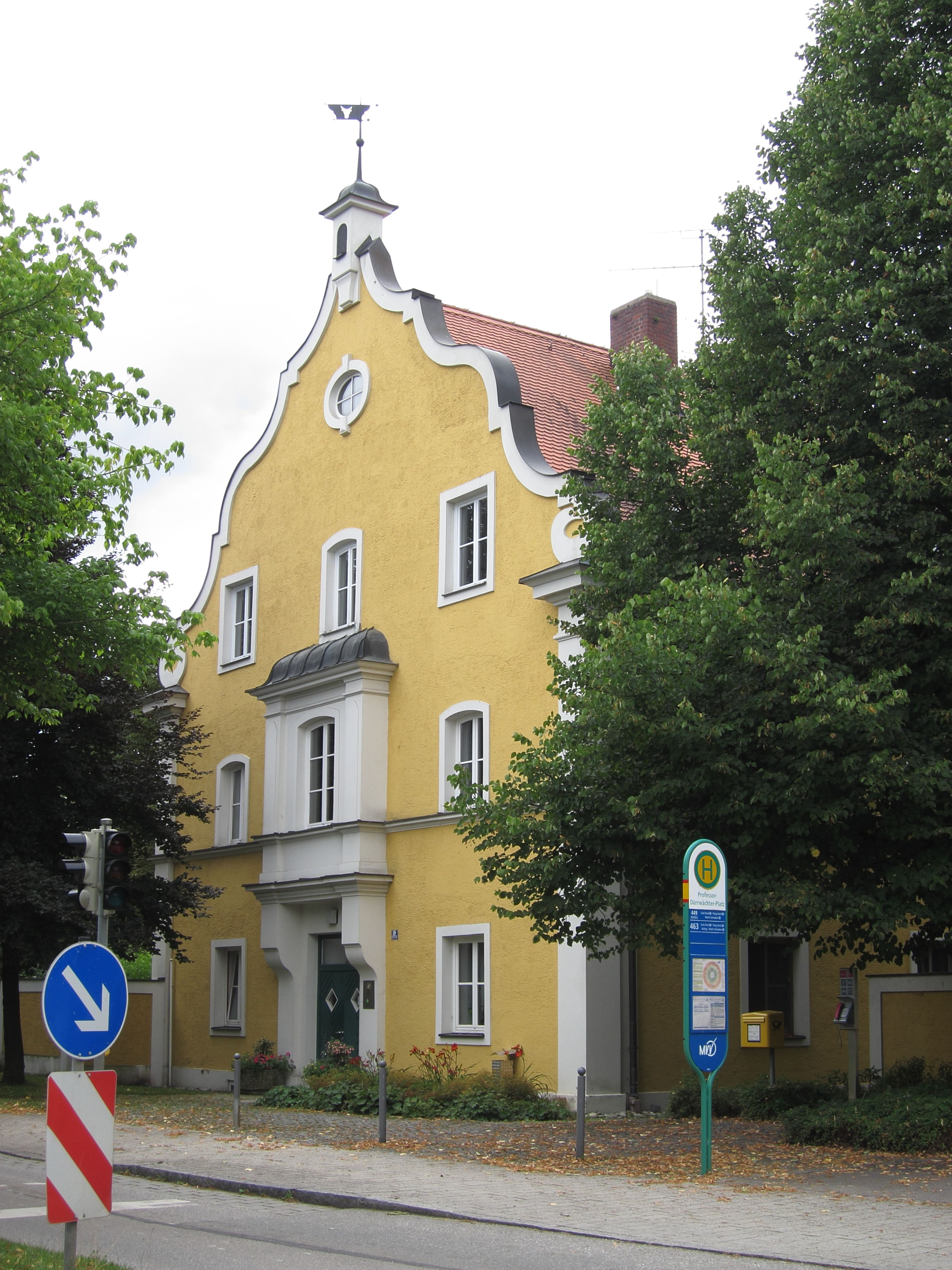 Grub, Professor-Zorn-Straße, Bayerische Landesanstalt für Landwirtschaft